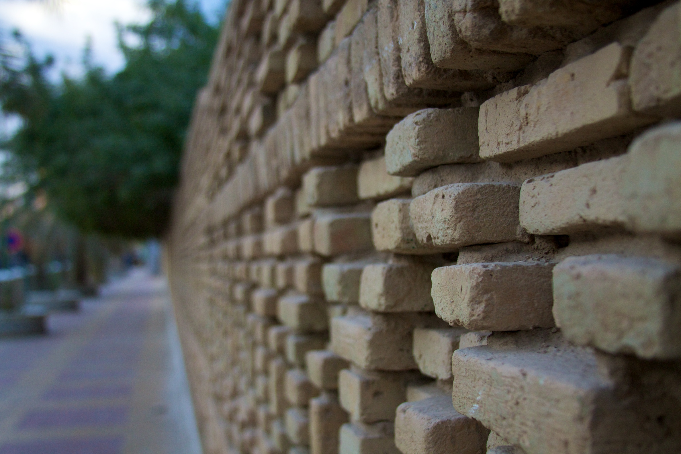 Tunisia 10-12 - 158 - Tozeur